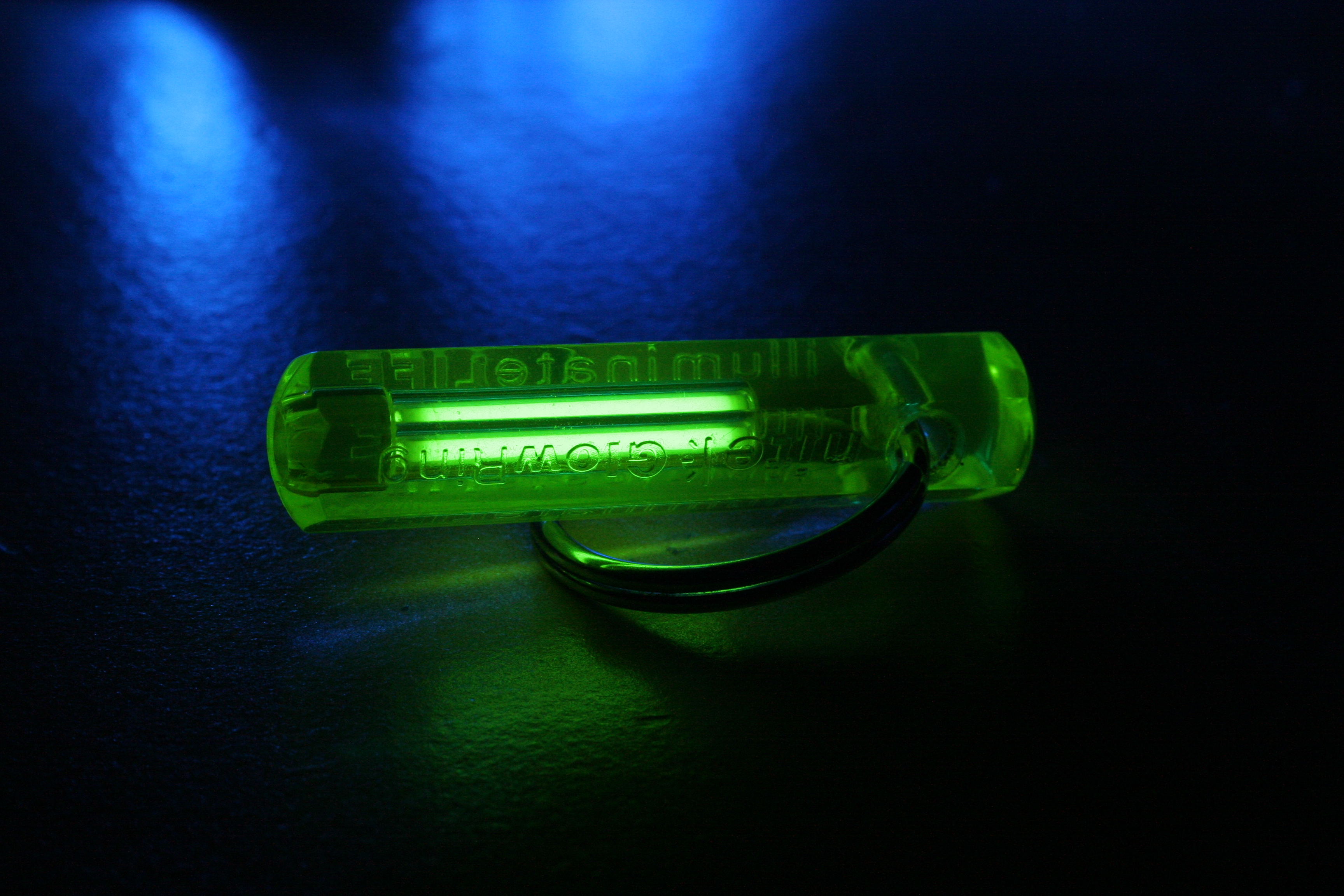 Radioluminescent Keychain by UK company "Nite" / Tritiumgaslichtquelle (Schlüsselanhänger) der britischen Firma "Nite"